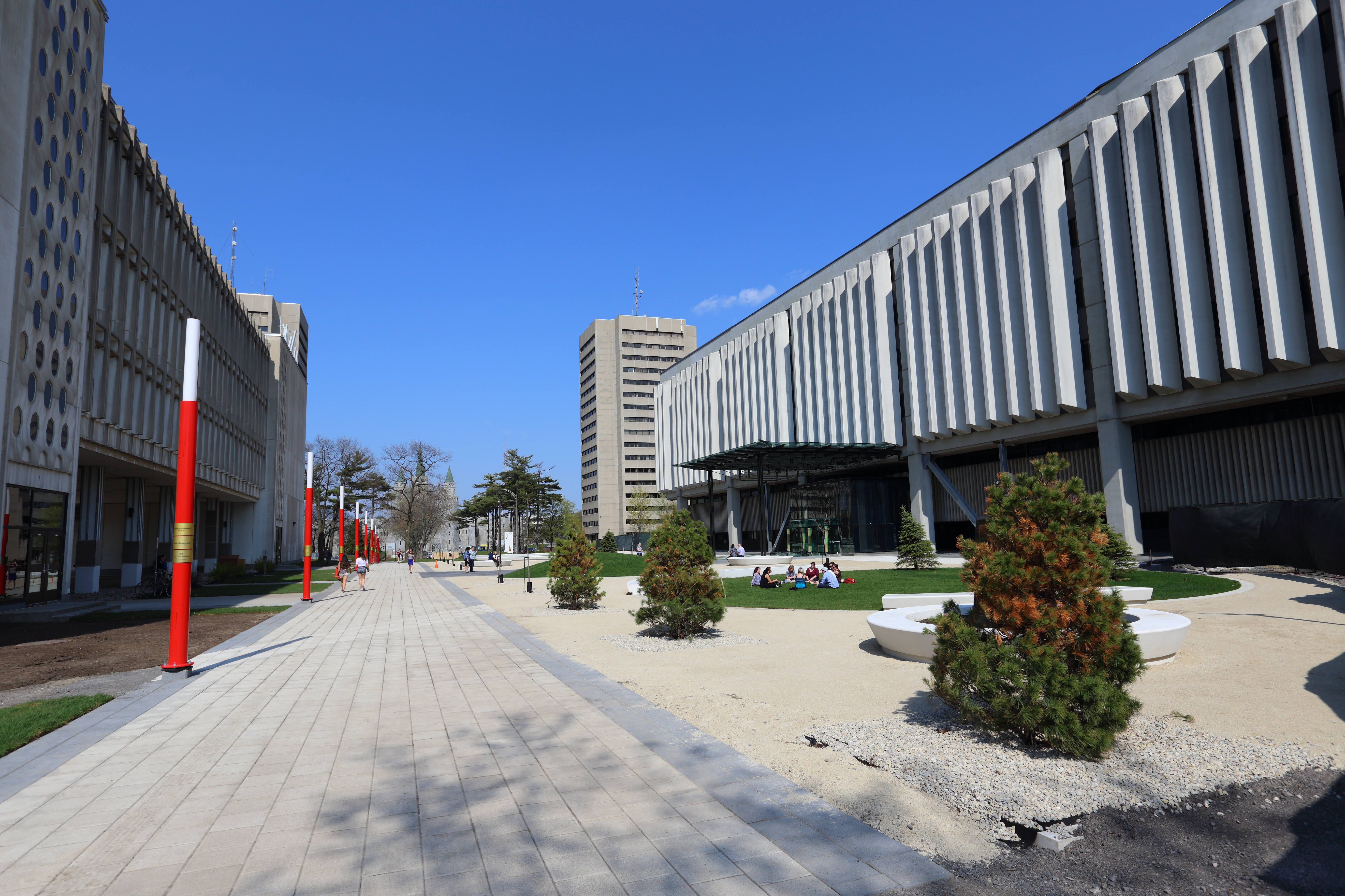 Promenade « Les Cent-Associés » entre les pavillons Jean-Charles-Bonenfant et Charles-De Koninck à l'Université Laval, Québec, Canada.